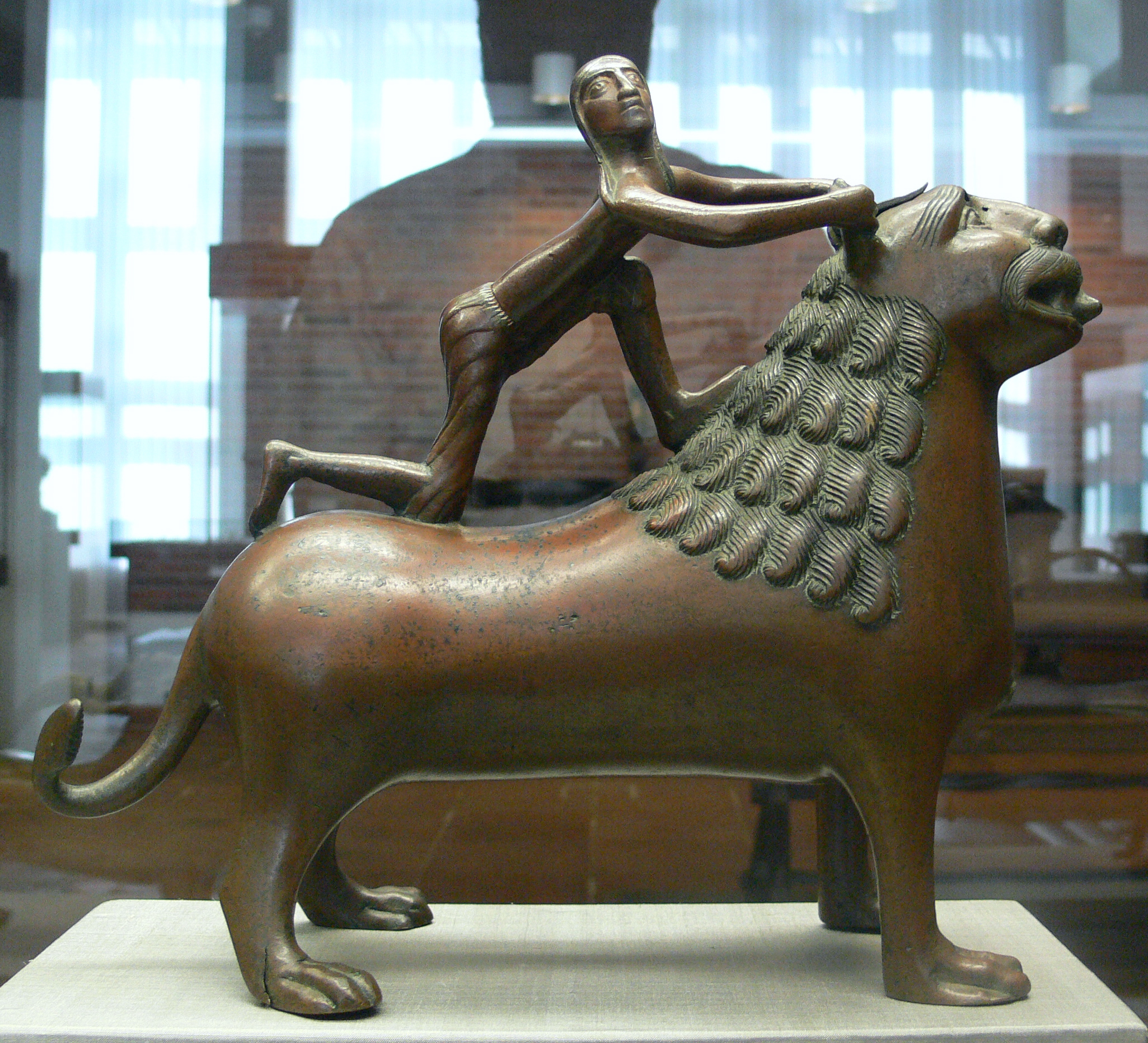 Samson-Aquamanile; Niedersachsen, 2. Viertel 12. Jh. Kunstgewerbemuseum Berlin, Inv. Nr. 34,5